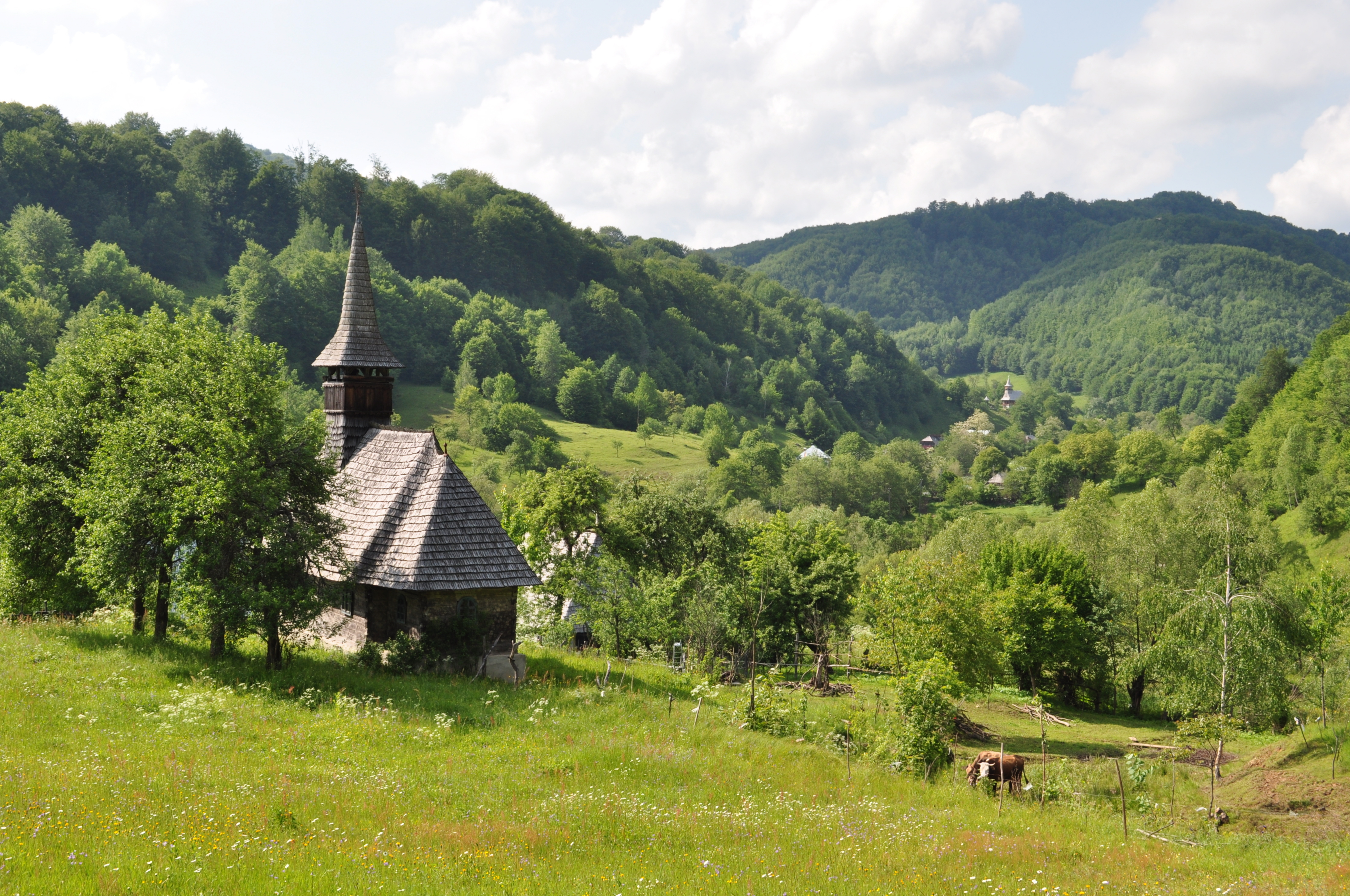 Biserica de lemn "Sf. Ioan Evanghelistul" , sat IZVOARELE; comuna CERNEŞTI